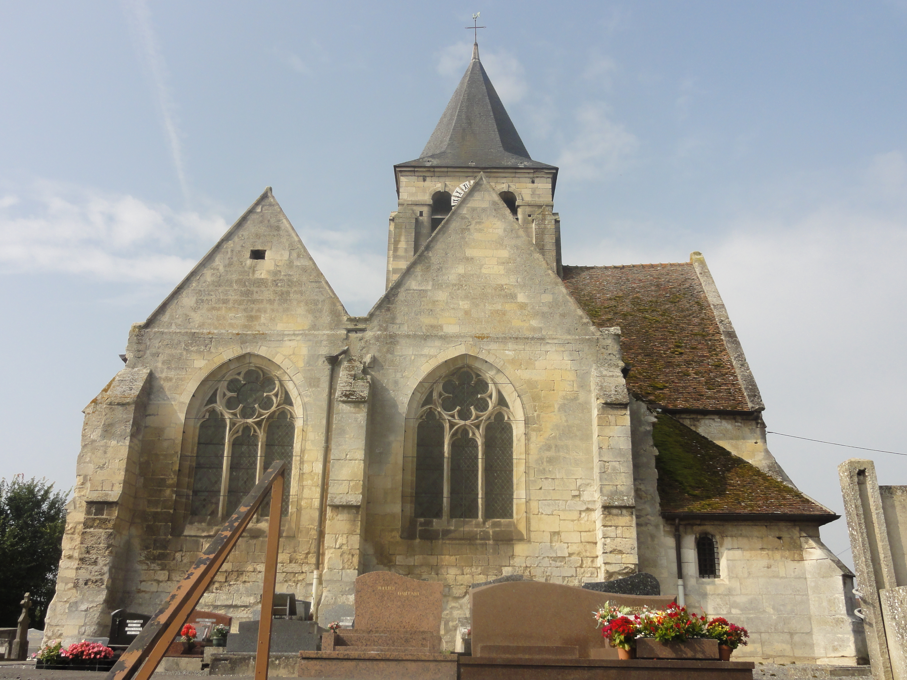 Chevet.